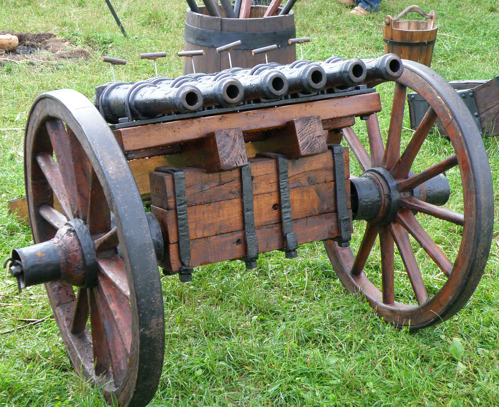 Warszawa, Park Skaryszewski, bitwa polsko-szwedzka o Warszawę z 1656 - obozowisko